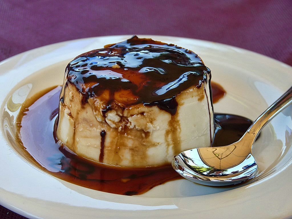 Un flan.